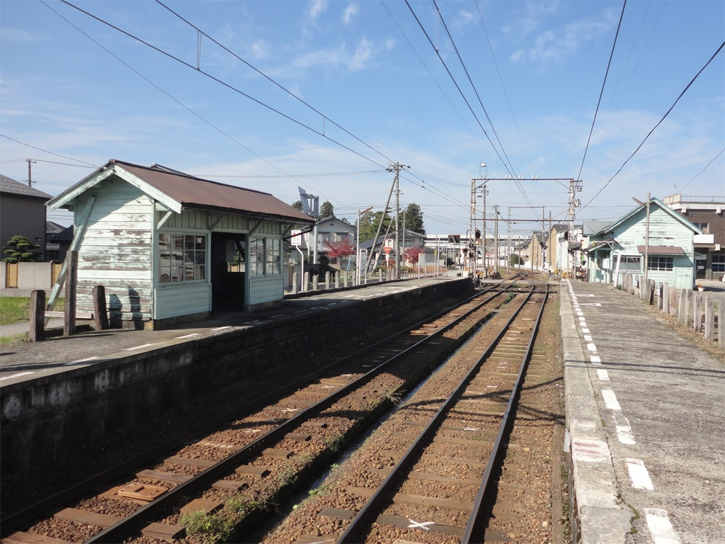 富山地方鉄道本線 舌山駅 ホーム